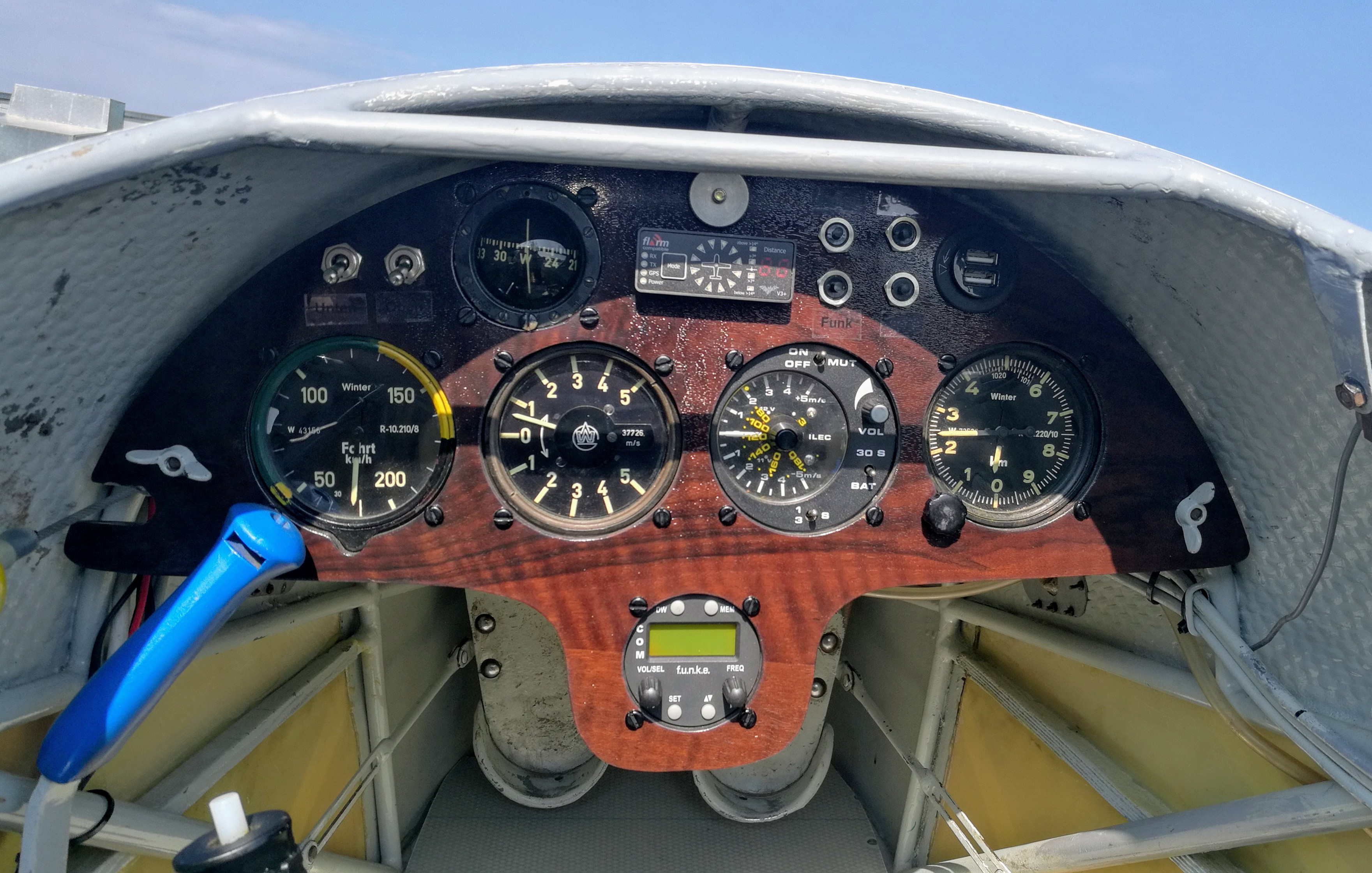 Instrumentenbrett einer Schleicher K 7